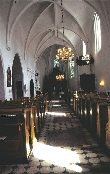 Øland Kirke i Danmark. Skibet set mod øst